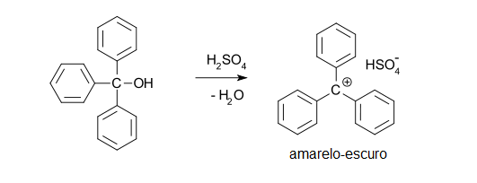 Grel